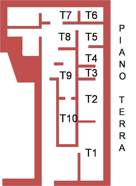 Pianta del piano terra di palazzo Farnese a Piacenza